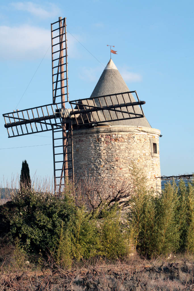 Windmill "moulin de la Badelle" in Saint Pantaleon (84), France